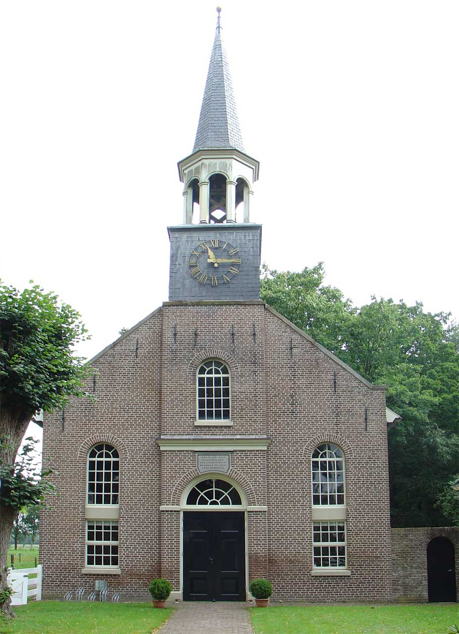 De 19e eeuwse Waterstaatskerk van Grolloo